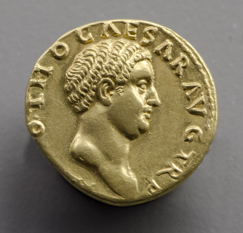 Moneda romana de oro de Marcus Salvius Otho, nació en el año 32 d.C. y fue un efímero emperador entre enero y abril del año 69 d.C. cuando murió. Fotografiada en la vitrina a través del cristal.